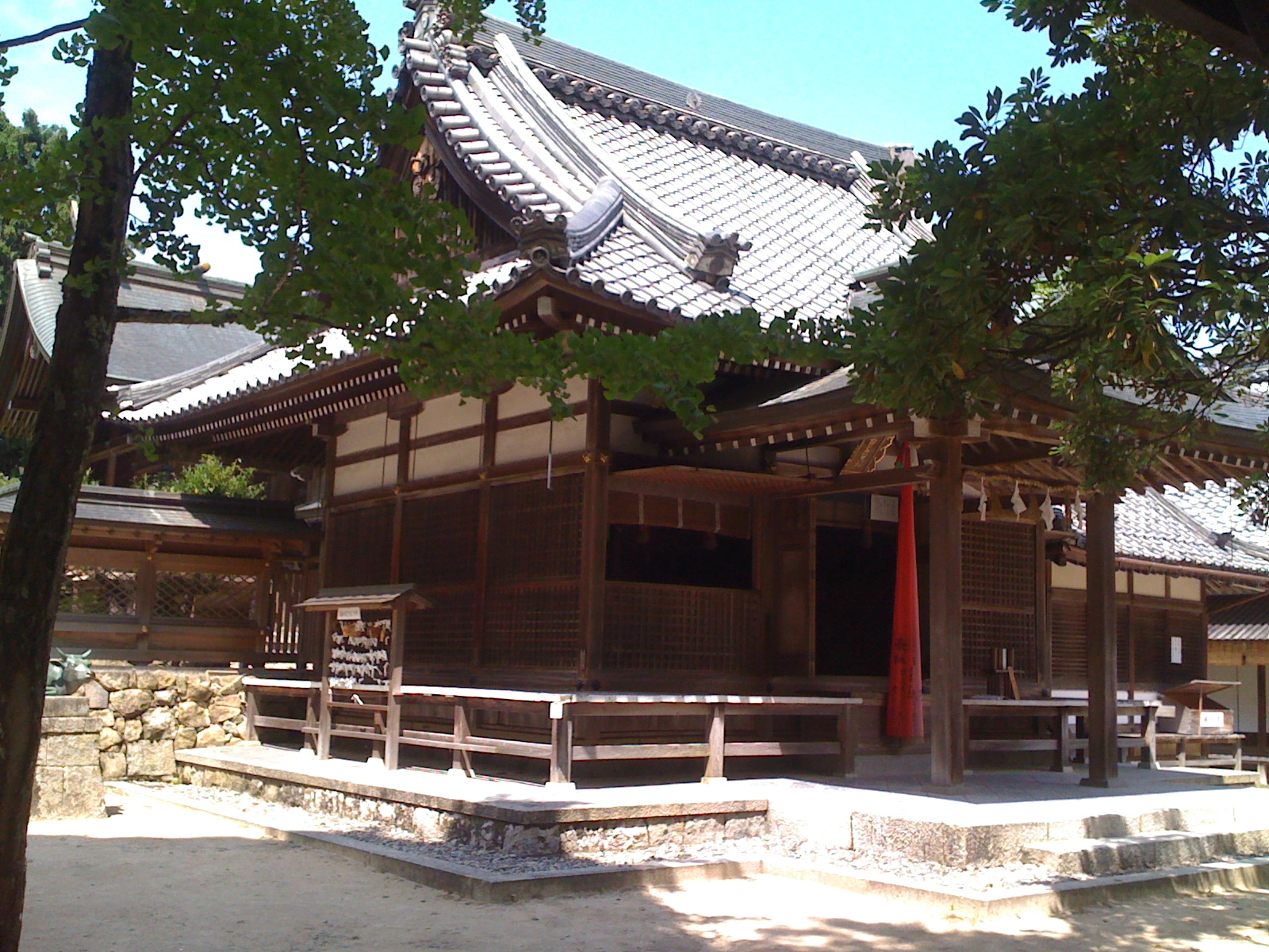 The Koujinyama-jinja(Shinto shrine) in Hikone, Shiga, Japan.